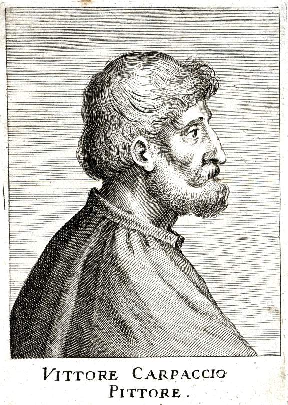 Vittore Carpaccio (um 1466- um 1525)